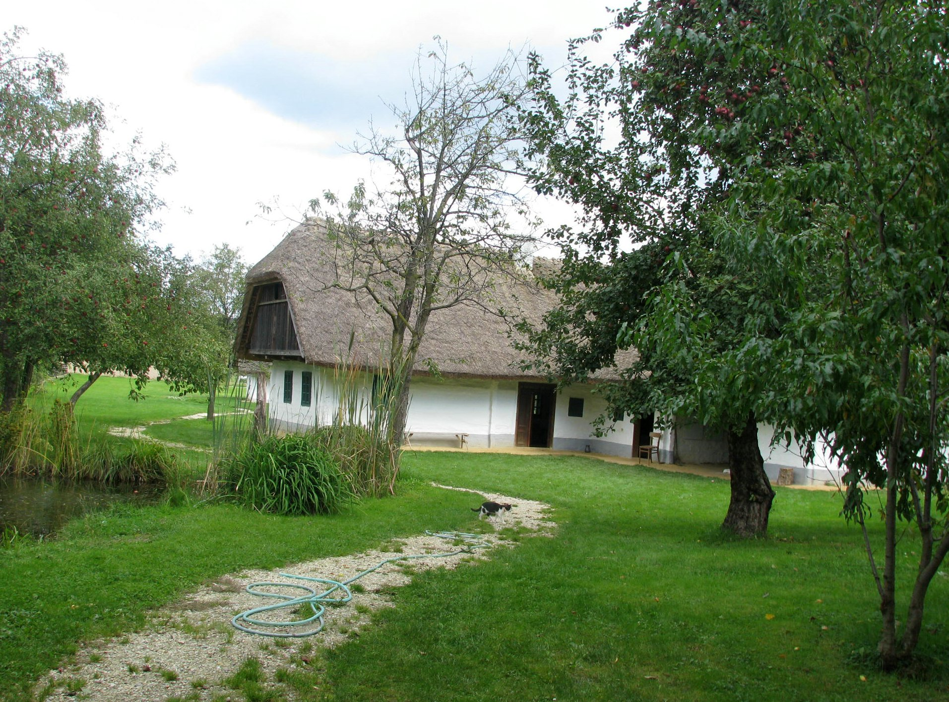 Lončatska vas, Filovci, Prekmurje, Slovenija